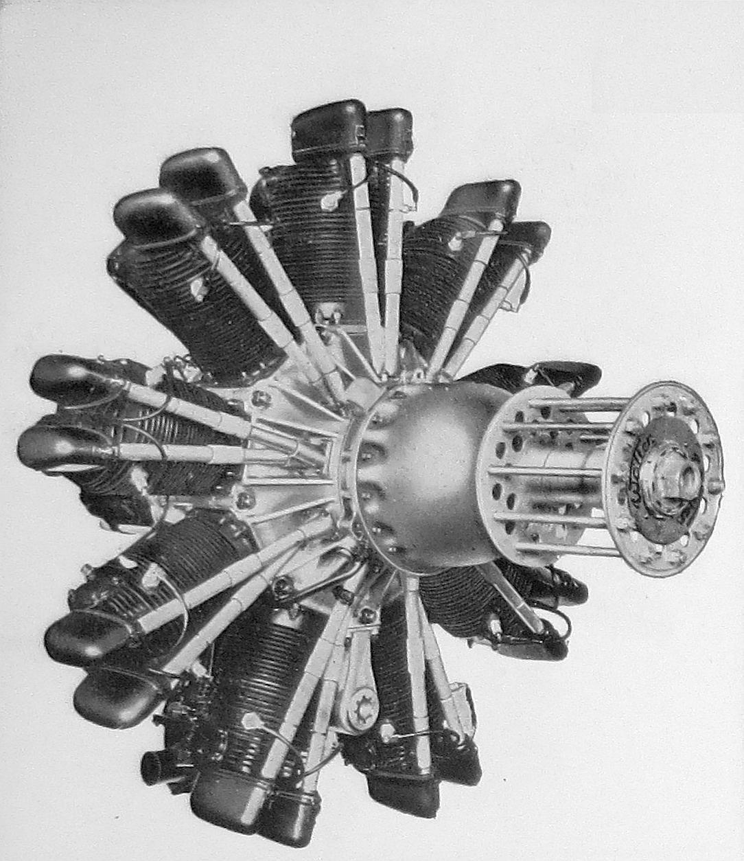 letecký motor Walter Pollux III-R (1935)